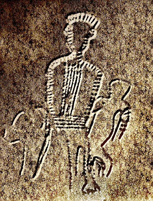 Grotta del Genovese, Levanzo (Italia) - Particolare